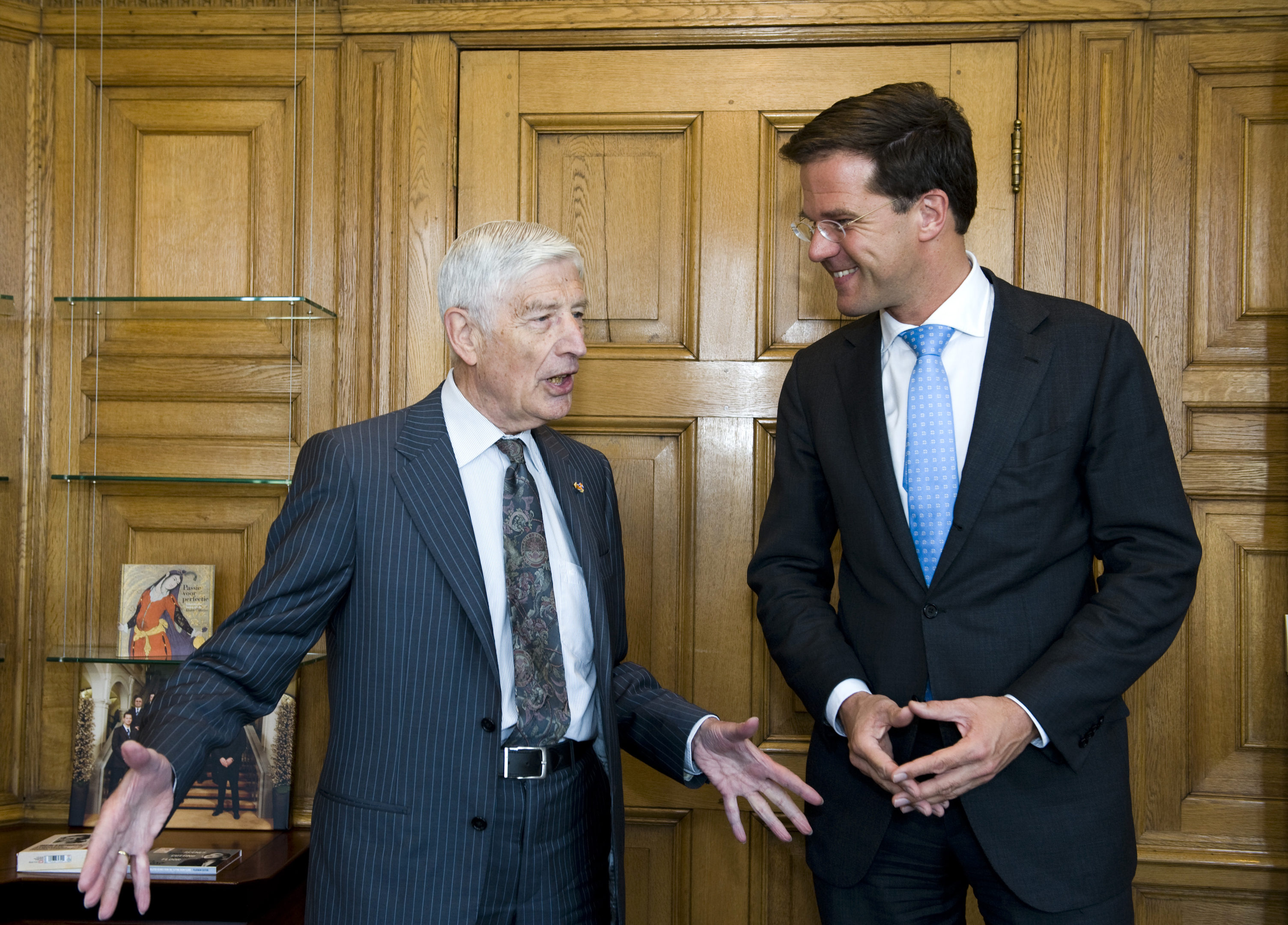 Minister-president Rutte ontvangt oud-premier Van Agt in het Torentje.